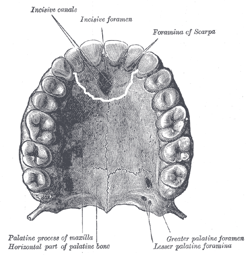 Os incisivum